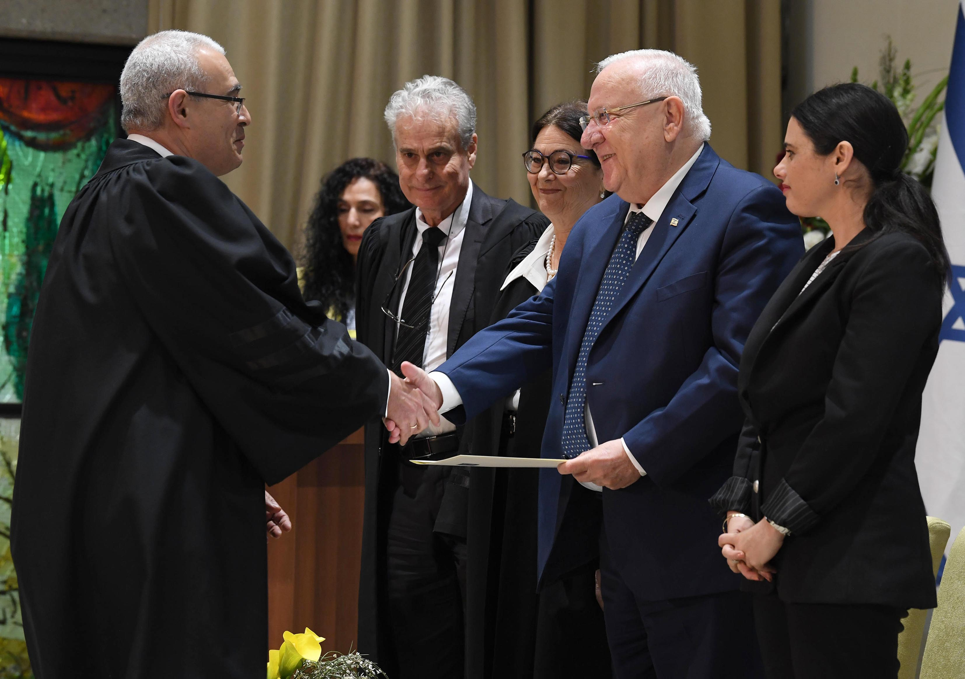 טקס השבעת שופטים בבית הנשיא. מימין: שרת המשפטים איילת שקד, נשיא המדינה ראובן ריבלין, נשיאת בית המשפט העליון אסתר חיות ונשיא בית הדין הארצי לעבודה יגאל פליטמן. משמאל: השופט עופר גרוסקופף